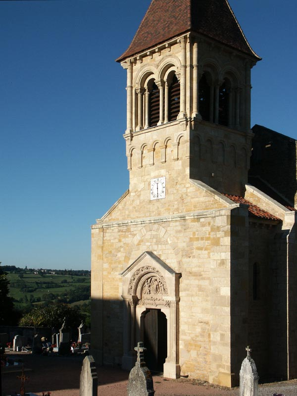 Clocher et portail de l'église de Saint-Julien-de-Jonzy